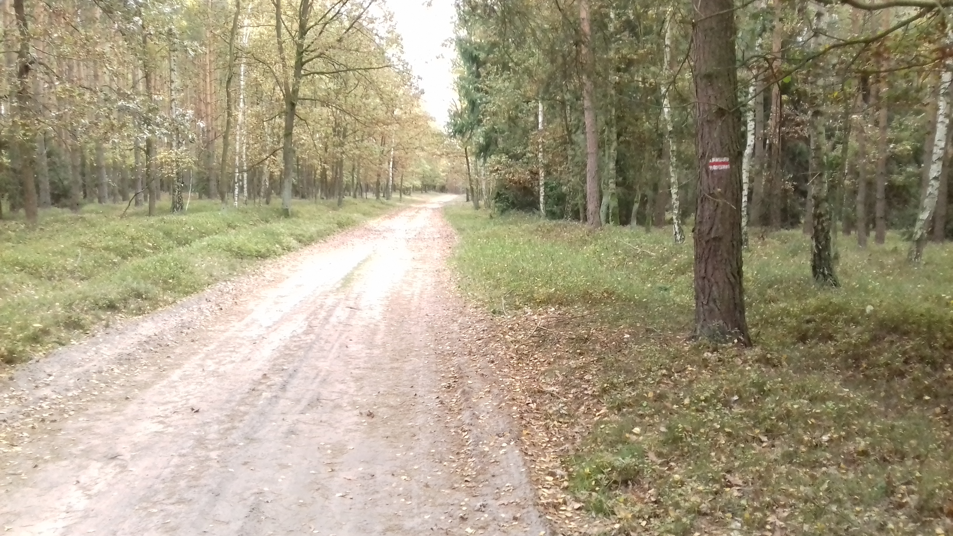 Szlak turystyczny nr 186 (czerwony) w lesie na południe od Błażejewka, w okolicach Jeziora Bnińskiego